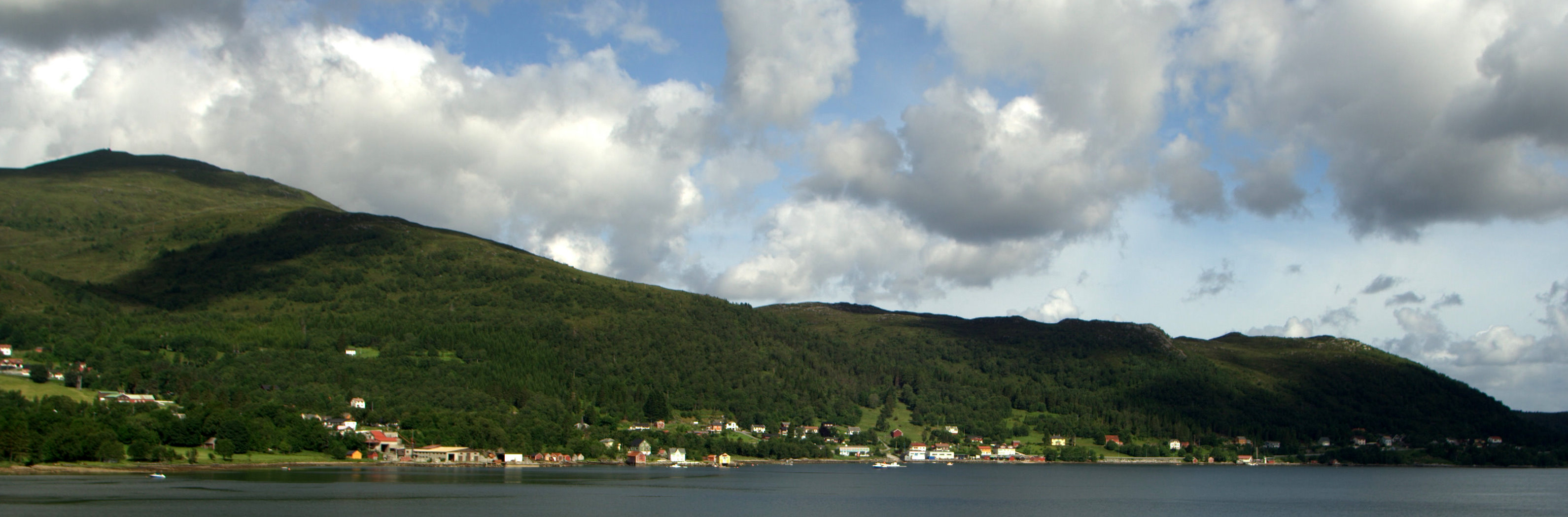 Leikong, Herøy, Norway